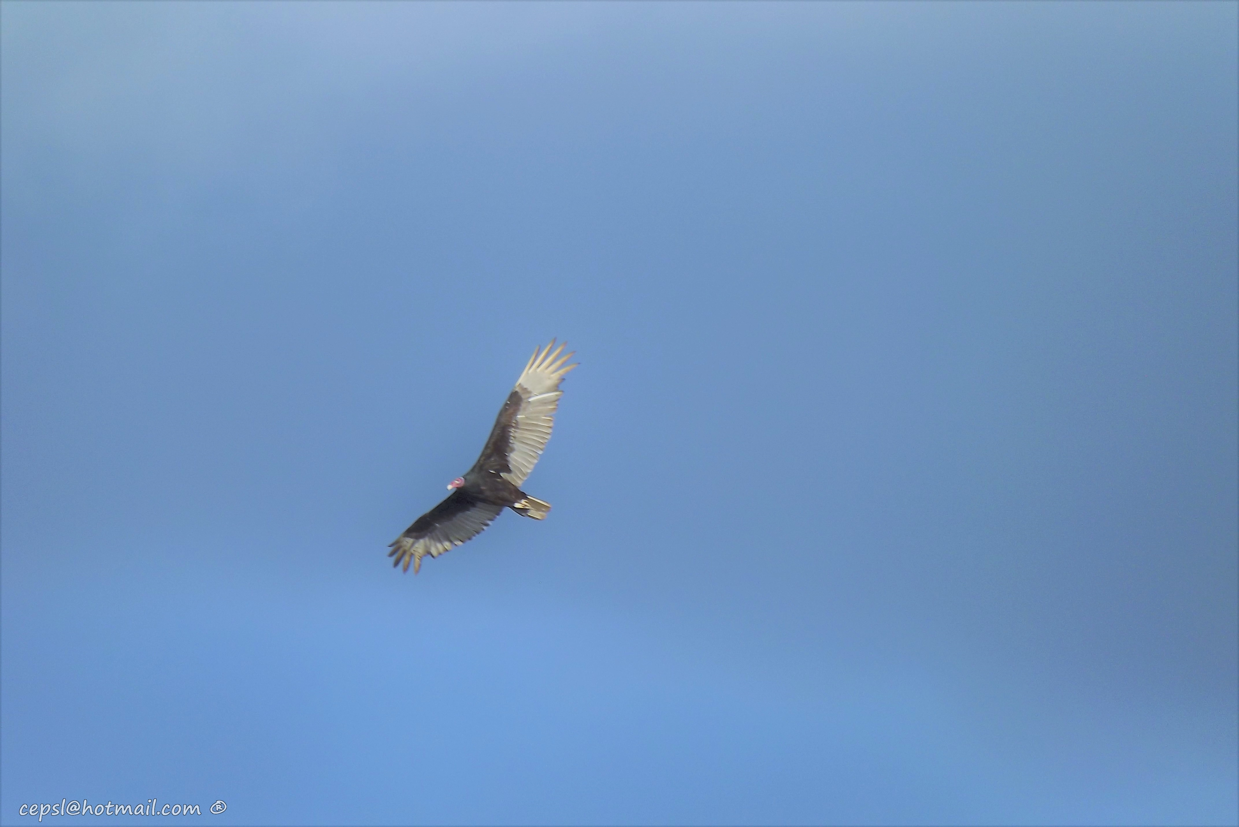 Ejemplar adulto en vuelo sostenido aprovechando las térmicas para elevarse y consumir menos energía.